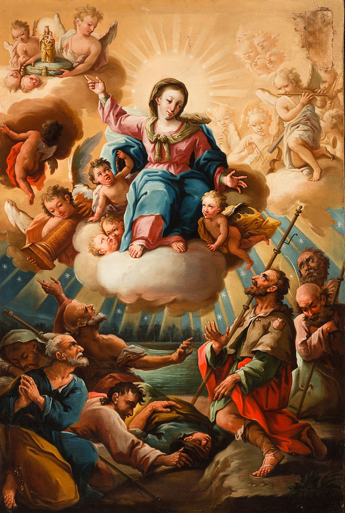 La obra representa el momento en que la Virgen del Pilar, patrona de España, se apareció aen la ciudad aragonesa de Zaragoza ante el apóstol Santiago el Mayor.